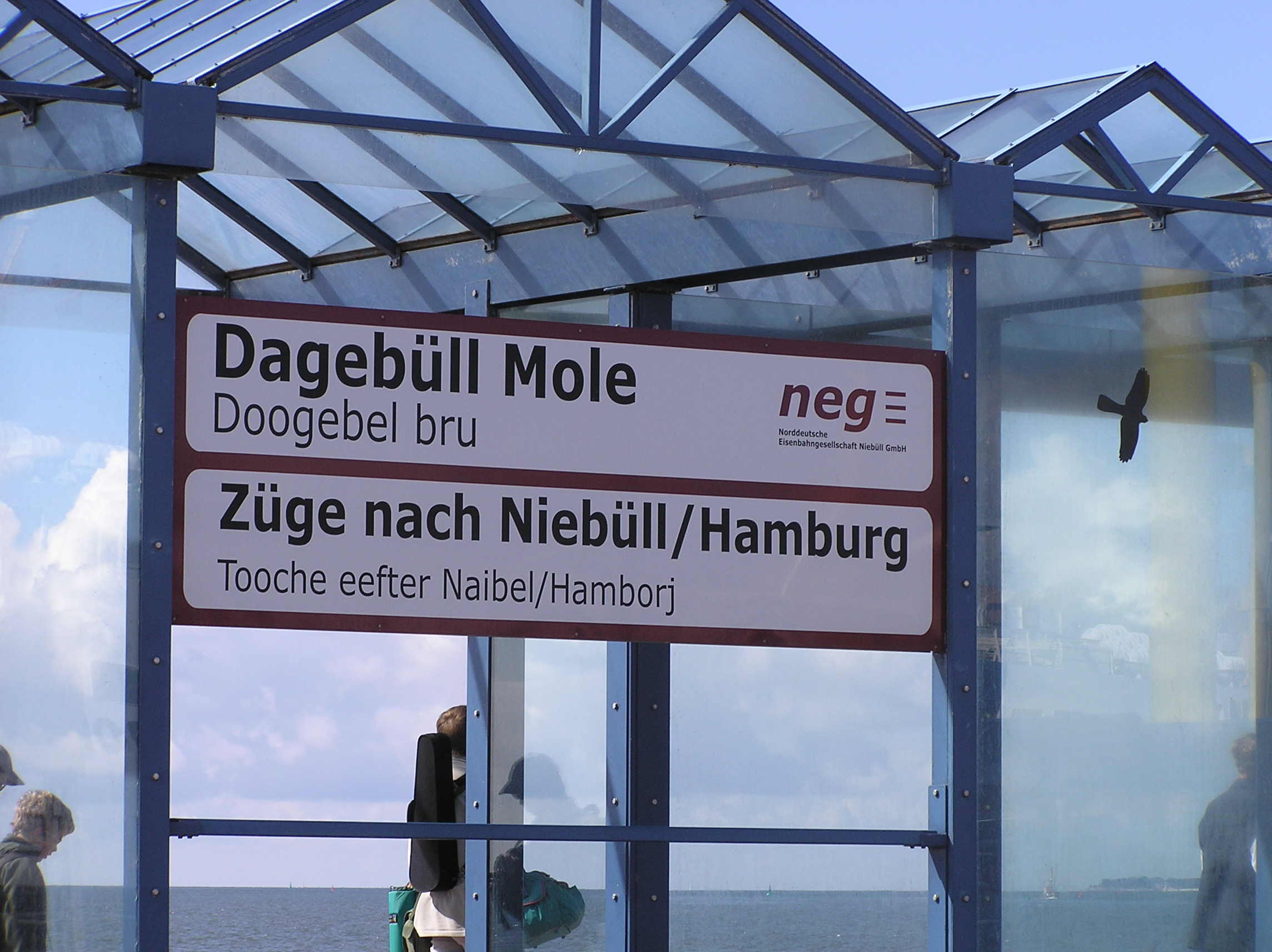 Schild Bf Dagebüll Mole